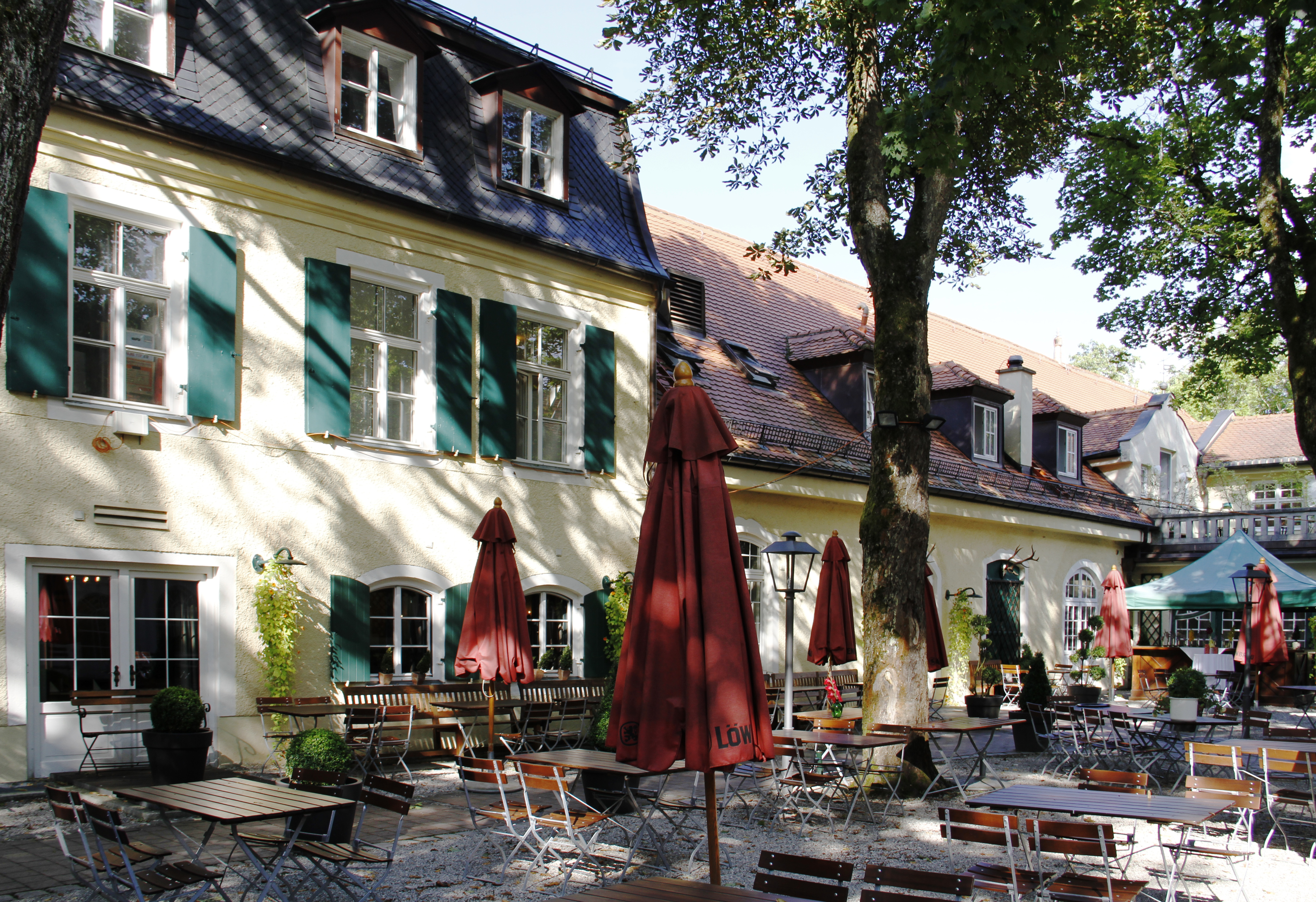 Gutshof Menterschwaige, München-Harlaching. Das Hauptgebäude vom Hof der Gaststätte.